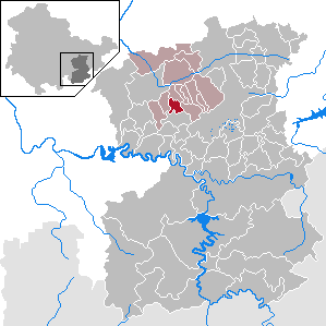 Gertewitz in Thuringia - Saale-Orla-Kreis